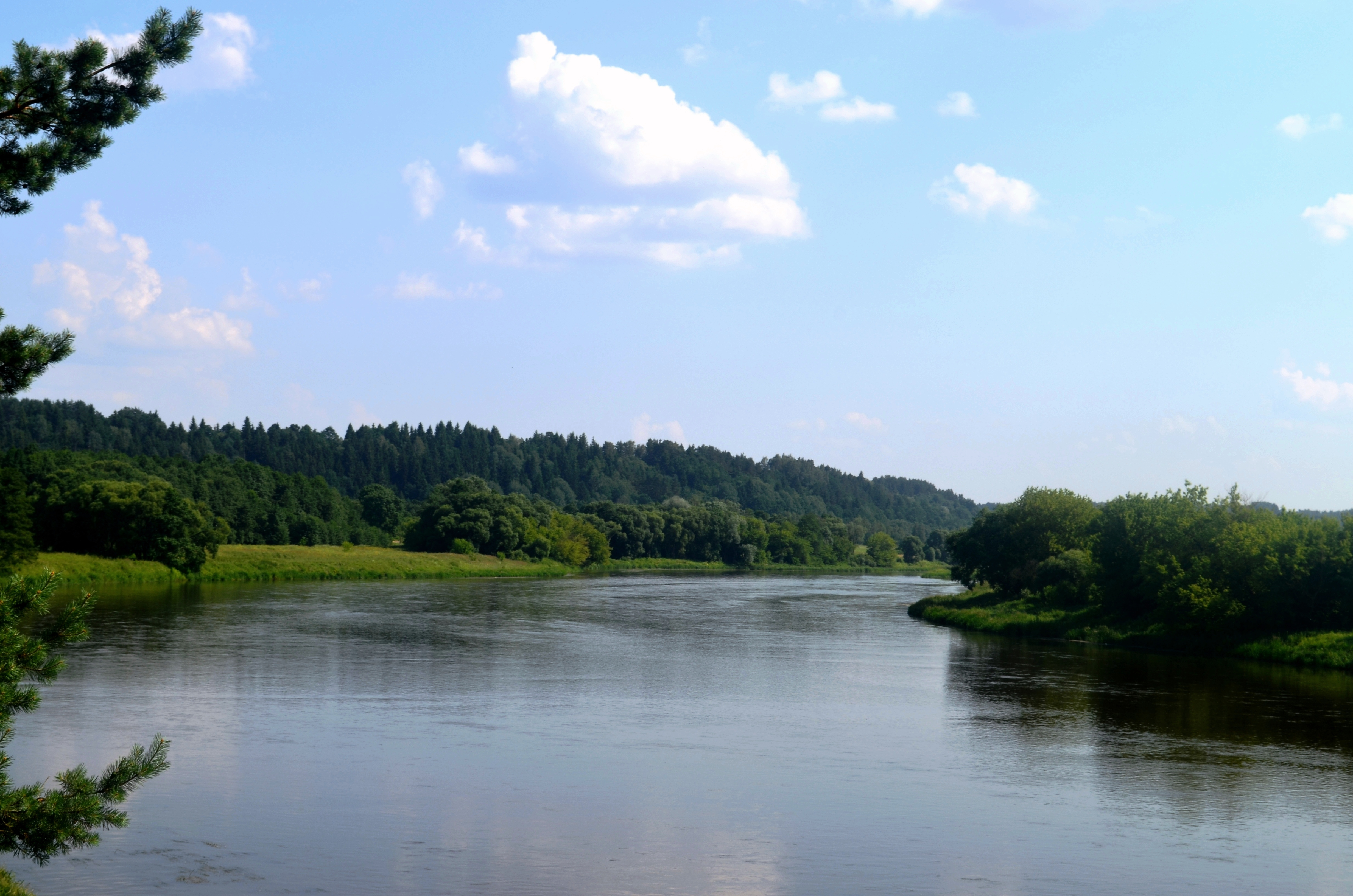 Neris netoli Kernavės, Širvintų raj.